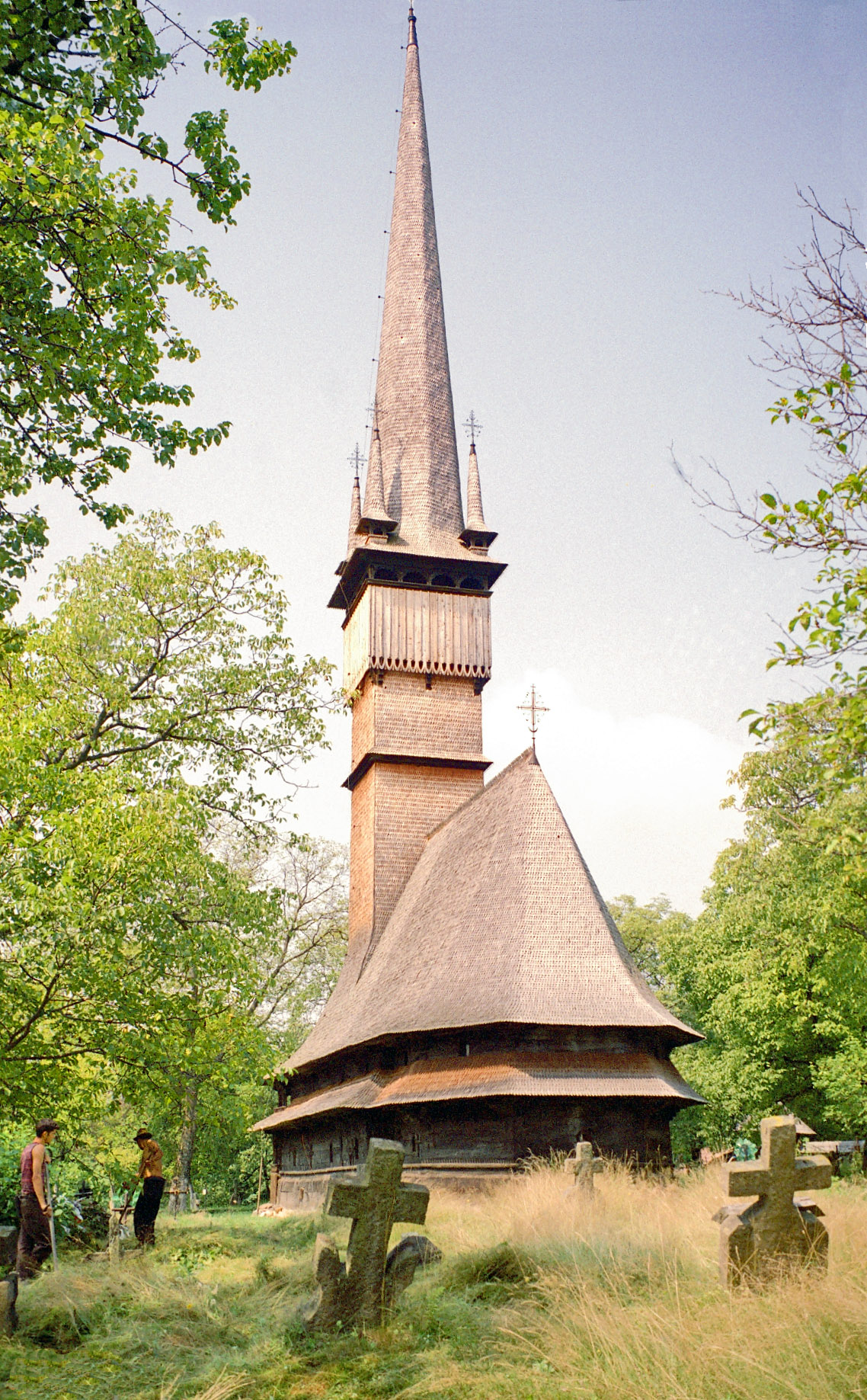 Şurdeşti, Maramureş: biserica de lemn din partea de jos a satului care este şi biserică parohială, datată 1766. 02